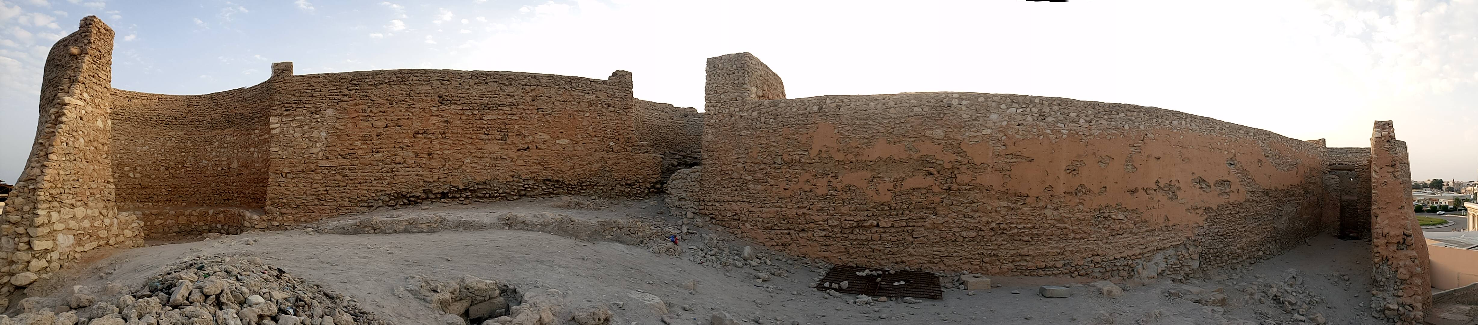 صورة بانورامية لقلعة تاروت من الداخل.